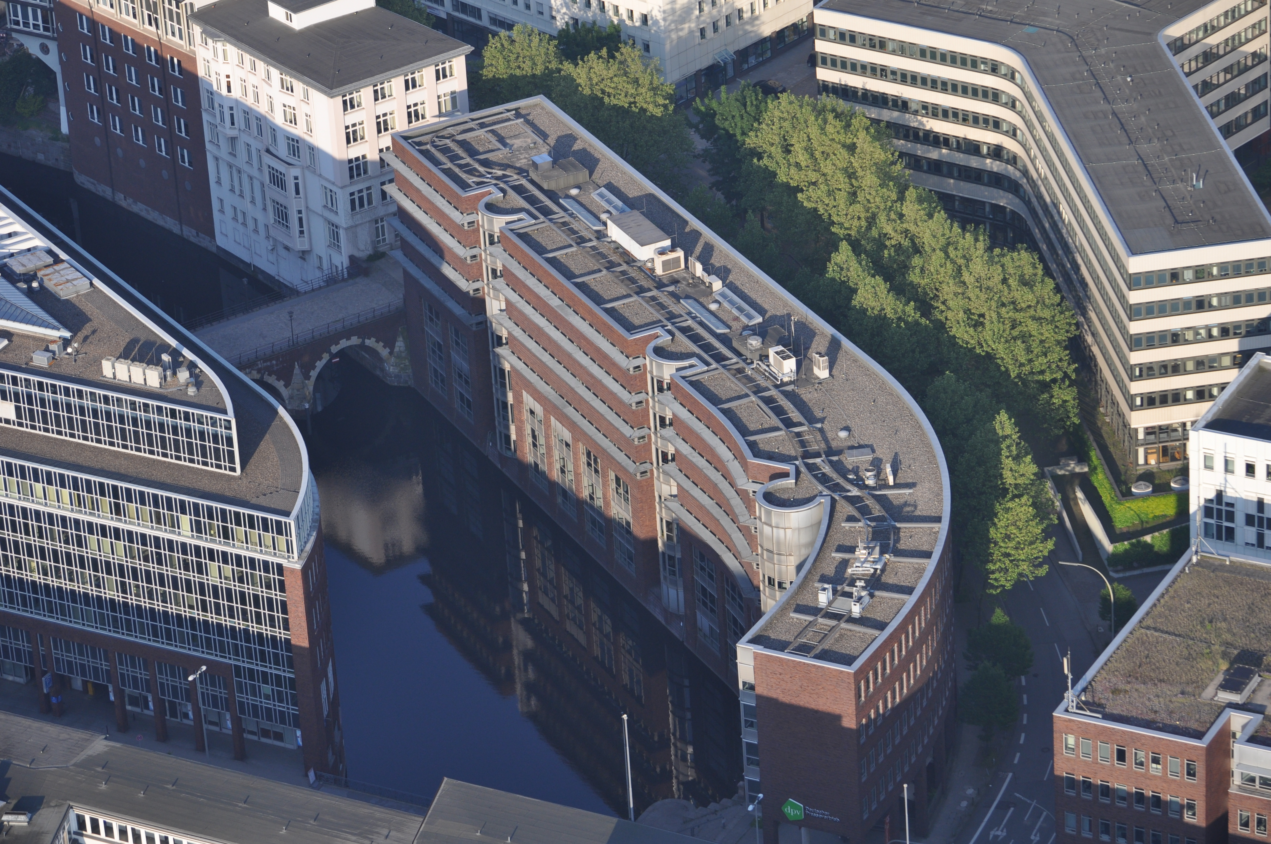 Düsternstraße und Herrengrabenfleet in Hmaburg-Neustadt.